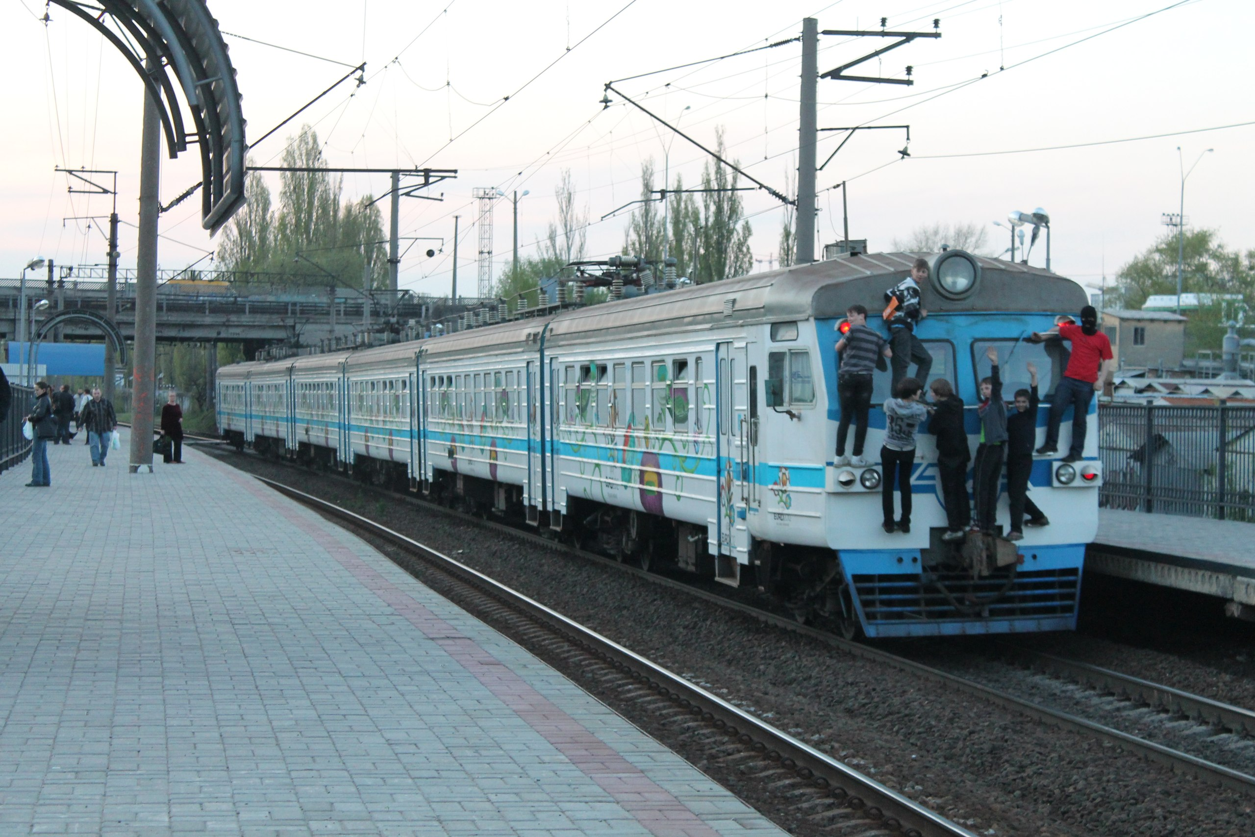 Зацепери на міській електричці в Києві, пл.Лівобережна